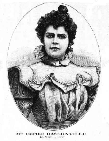 La Muse Lilloise élue en 1898.